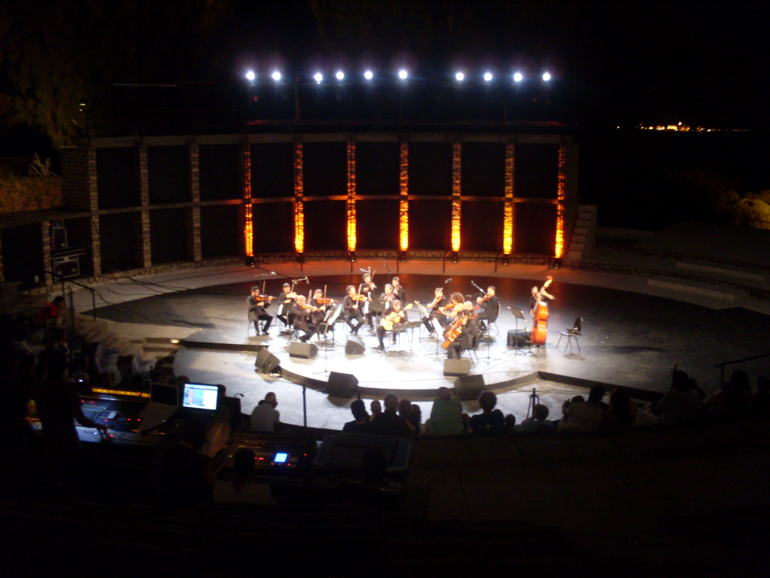 Festival international de Hammamet, Tunisie, juillet 2010